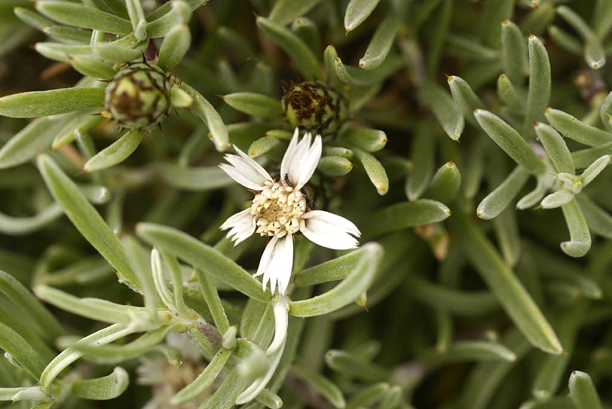 'Atractylis arbuscula - Vista cenital - Lanzarote (Islas Canarias, España).